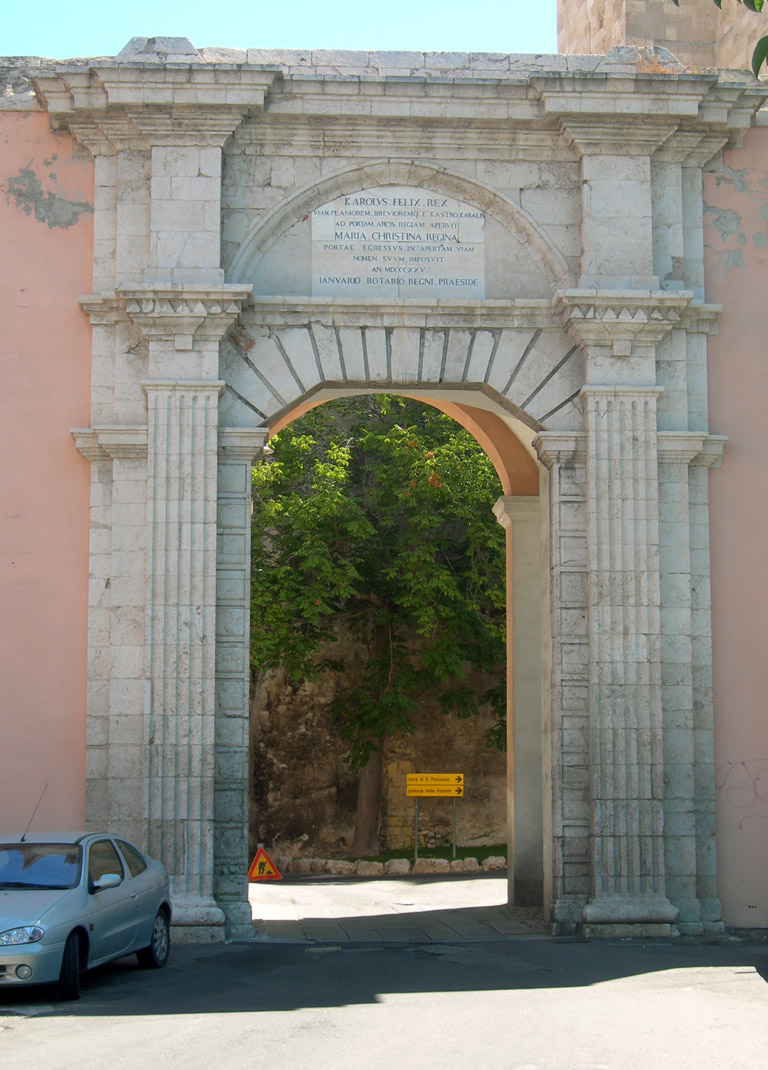 Cagliari (Italy), "Porta Cristina" Gate.